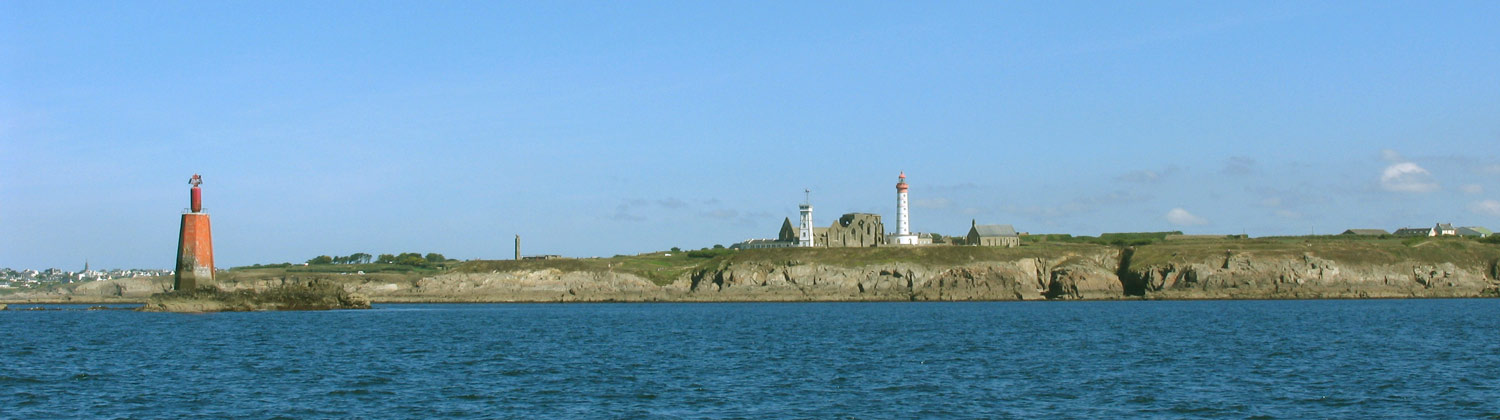 Description : Les amers de la Pointe Saint-Mathieu (Bretagne, France). Au premier plan, la tourelle des Vieux Moines. Place : Pointe Saint Mathieu, Bretagne, France Date : 2005 Author : Pline Photo personnelle